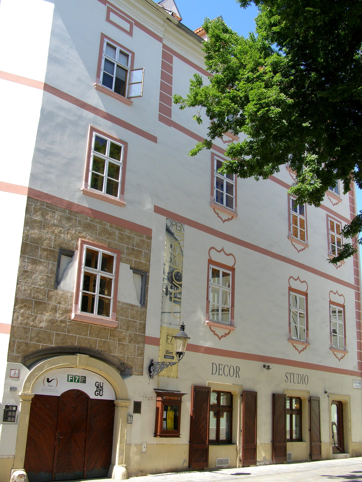 Františkánske námestie č. 7 Object location48° 08′ 38.4″ N, 17° 06′ 29.88″ E